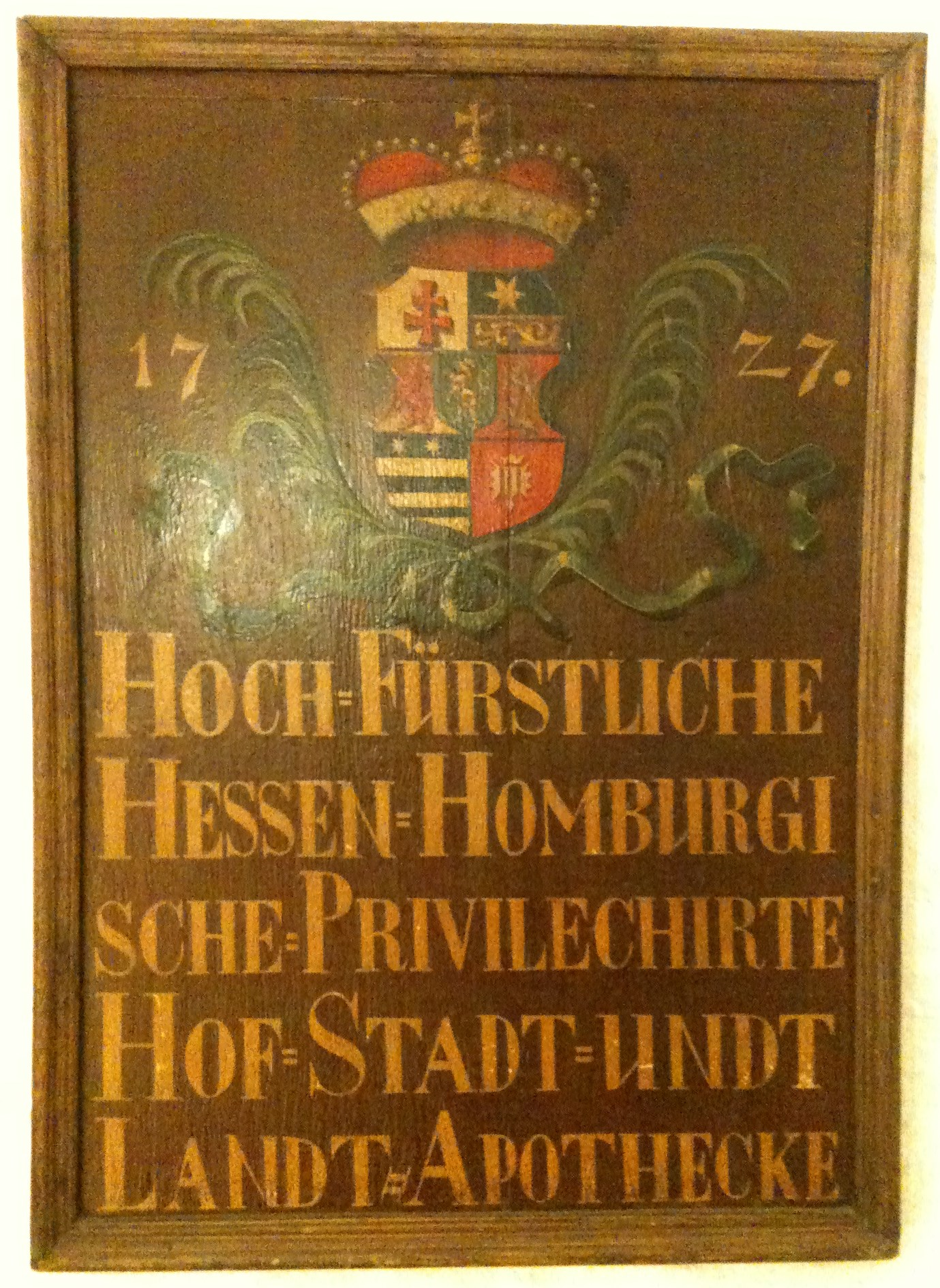 Deutschland - Hessen - Hochtaunuskreis - Bad Homburg, Dorotheenstraße 10 (?): Holztafel "1727 - Hoch-Fürstliche Hessen-Homburgische-Privilechirte Hof-Stadt- und Landt-Apotecke" (Original im Deutschen Apothekenmuseum, Heidelberg)